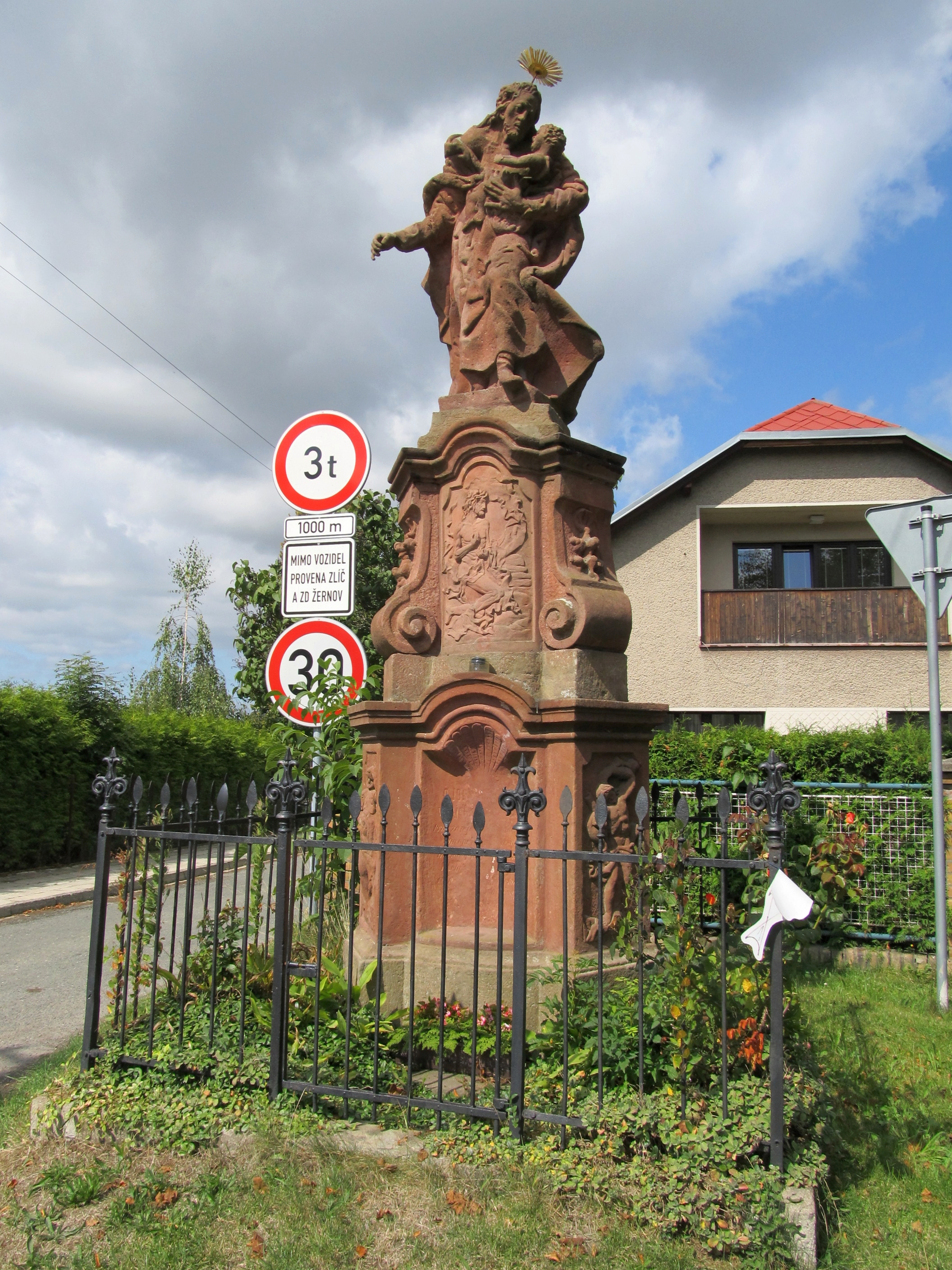 Socha sv. Josefa s Ježíškem (Studnice), při čp. 59, Studnice